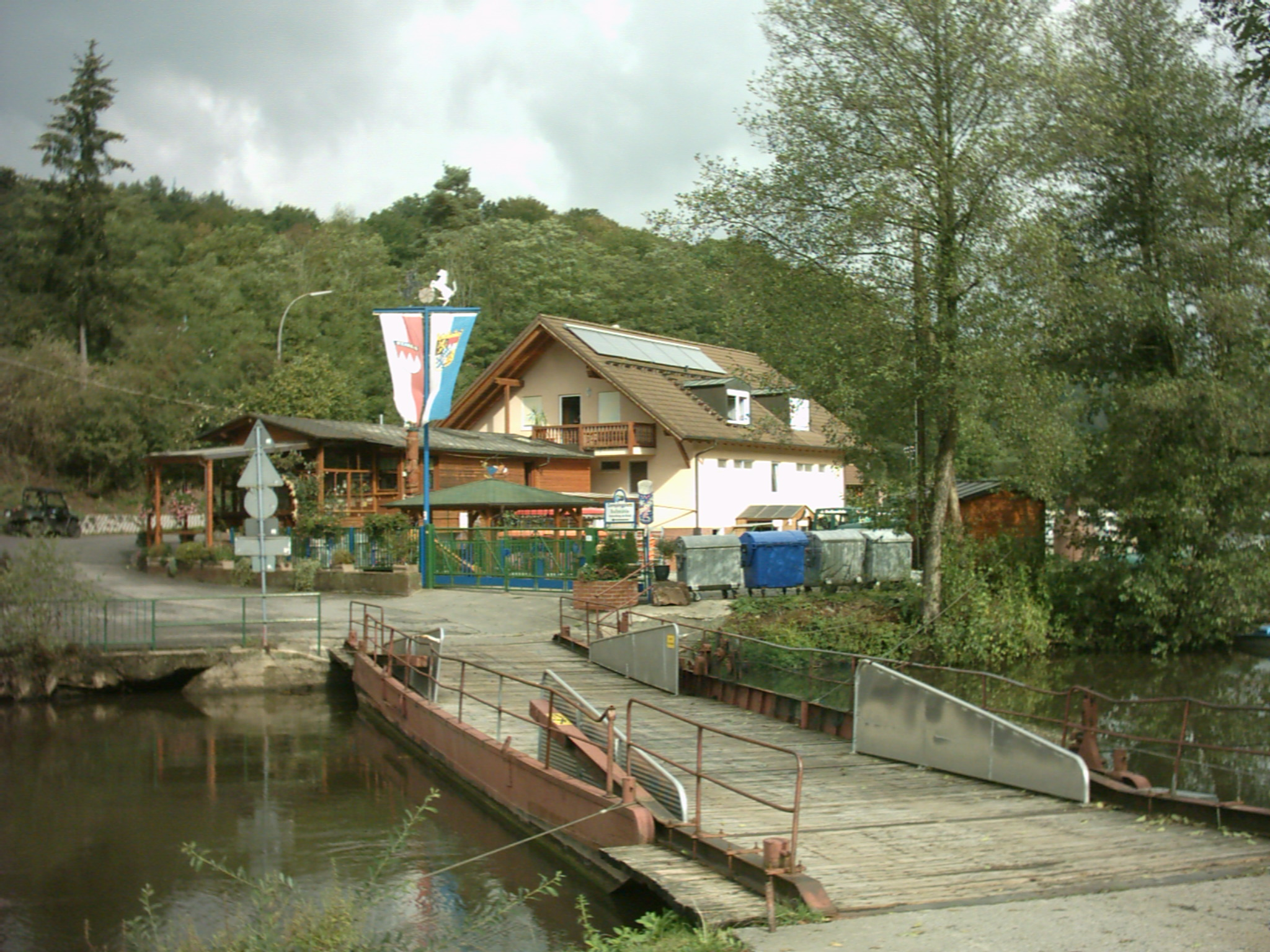 Schwimmbrücke über die Fränkische Saale an der Roßmühle (nordwestlich Weickersgrüben)